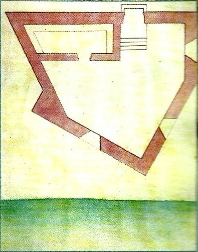 Forte de Nossa Senhora da Luz. MACHADO, Francisco Xavier. "Revista dos Fortes e Redutos da Ilha Terceira" (1772). in MARTINS, José Salgado, "Património Edificado da Ilha Terceira: o Passado e o Presente". Separata da "Atlântida", vol. LII, 2007. p. 48.